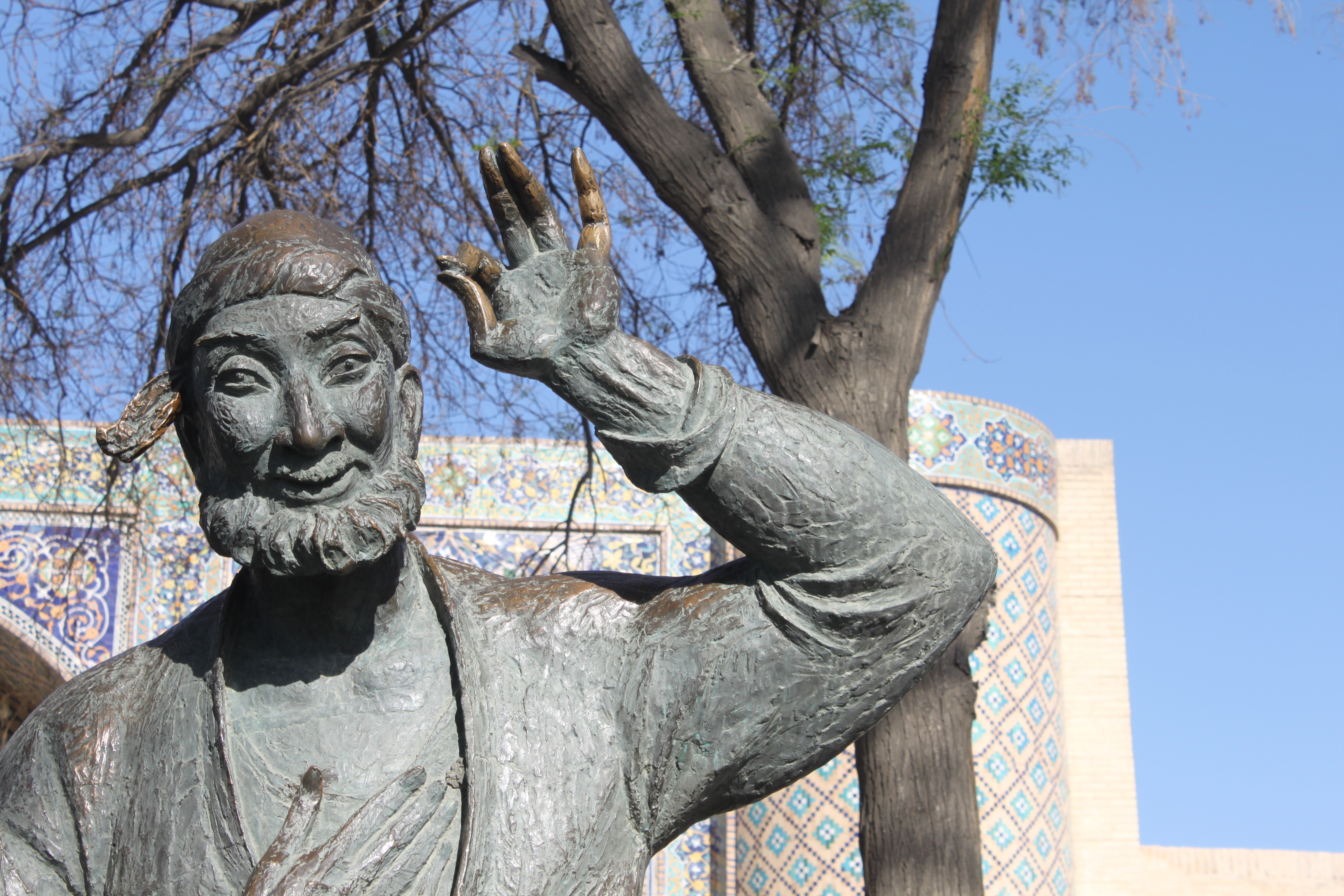 Détail de la statue de Nasr Eddin Hodja sur la place de Liab-i-Haouz à Boukhara